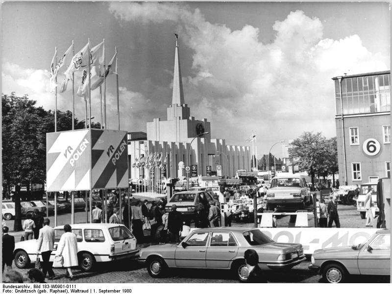 Leipzig, Herbstmesse, Personenkraftwagen ADN-ZB Grubitzsch 1.9.80-frs-Leipzig: Herbstmesse 1980-Insgesamt sind zur diesjährigen Herbstmesse 25 polnische Außenhandelsunternehmen präsent. Größter Auslandsaussteller in der Branche Straßenfahrzuege ist das Außenhandelsunternehmen Pol-Mot, das in der Halle 5 und auf dem Freigelände eine Gesamtfläche von rund 2.000 Quadratmetern belegt. - Im Hintergrund die Halle 12 (UdSSR).